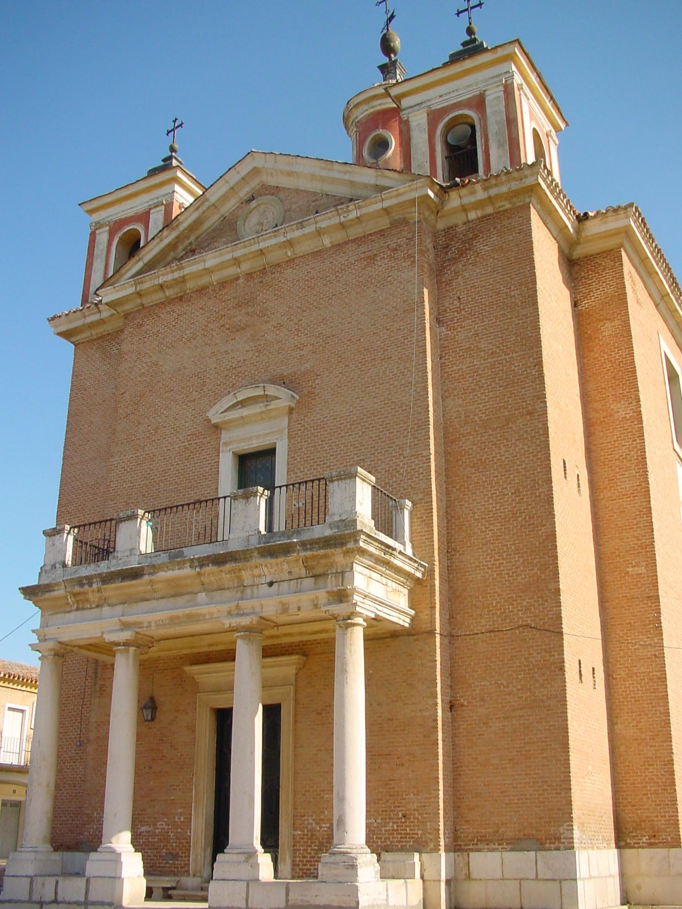 Ermita del Real Cortijo de San Isidro en Aranjuez.